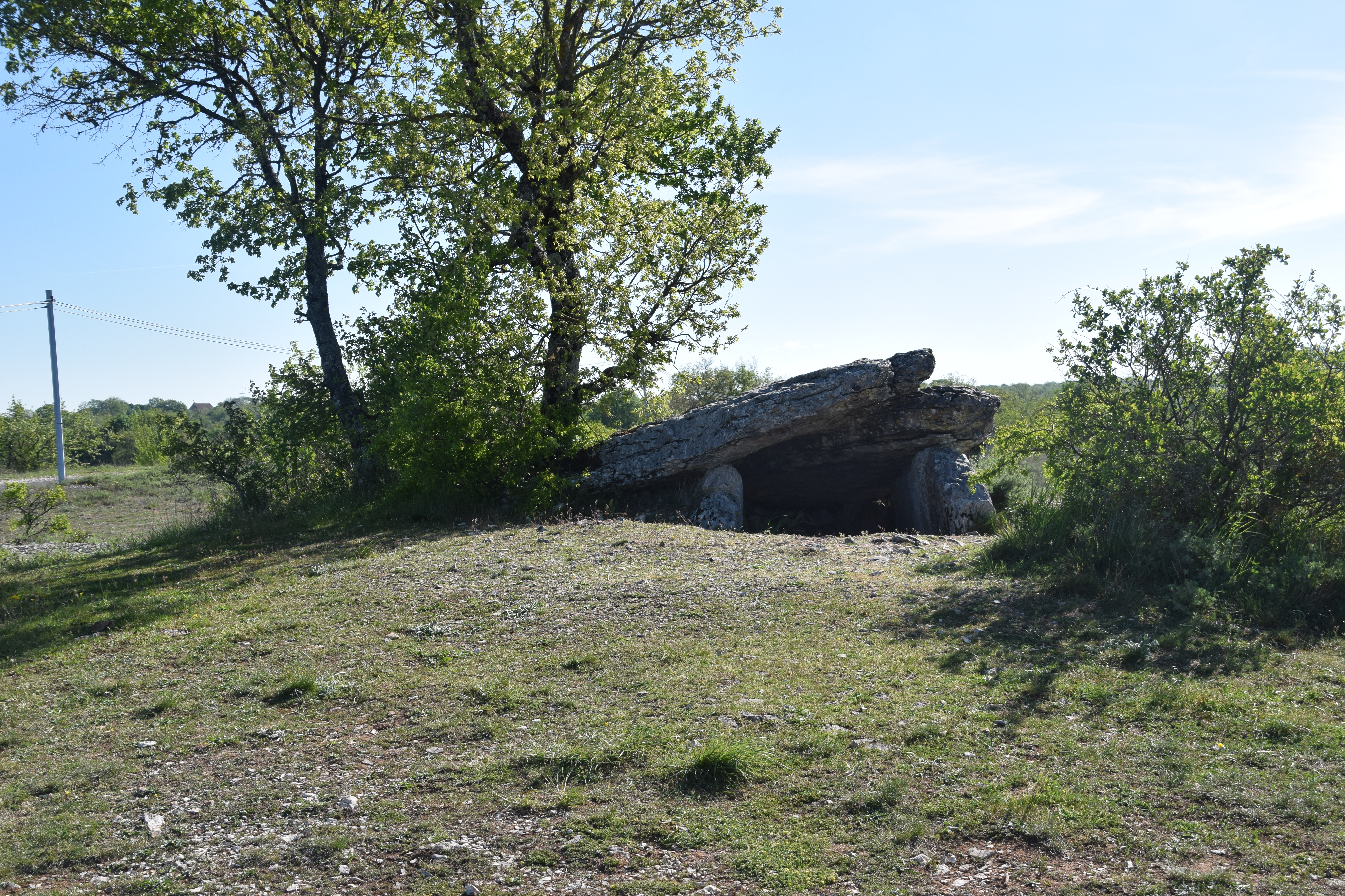 Dolmen de Magès, Rocamadour, Lot, France